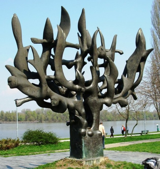 Spomenik jevrejskim žrtvama nacističkog genocida u Beogradu, lokacija 25 Maj. Slikao Goldfinger